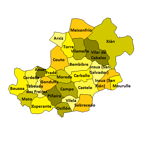 Mapa das parroquias do concello de Taboada.